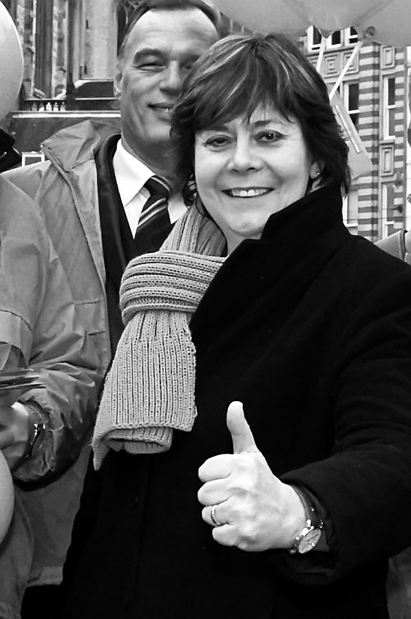 Foto wordt gebruikt op de website van Trots, zonder naamsvermelding van de fotograaf (ik dus). Normen en waarden zou Balkenende zeggen. Dit is niet netjes, ik wacht op een reactie van Trots.